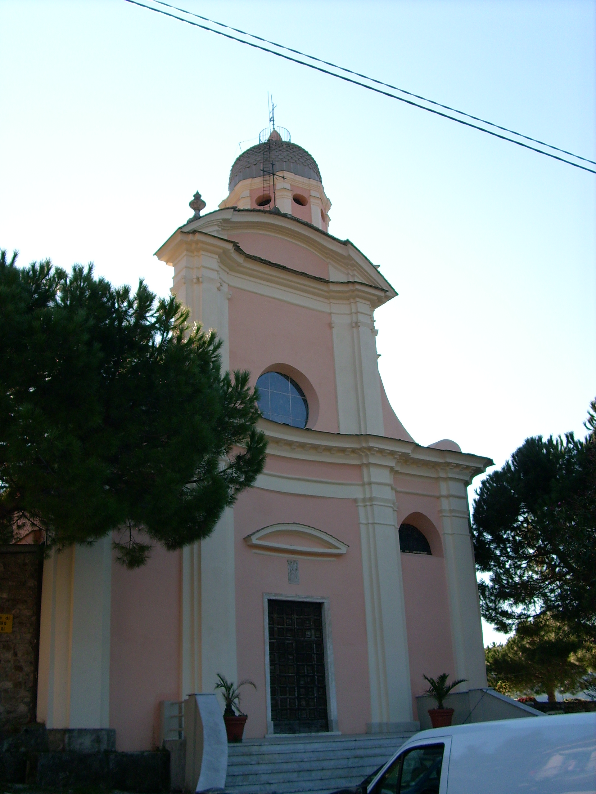 Chiesa di San Siro di Montale, Levanto, Liguria, Italia